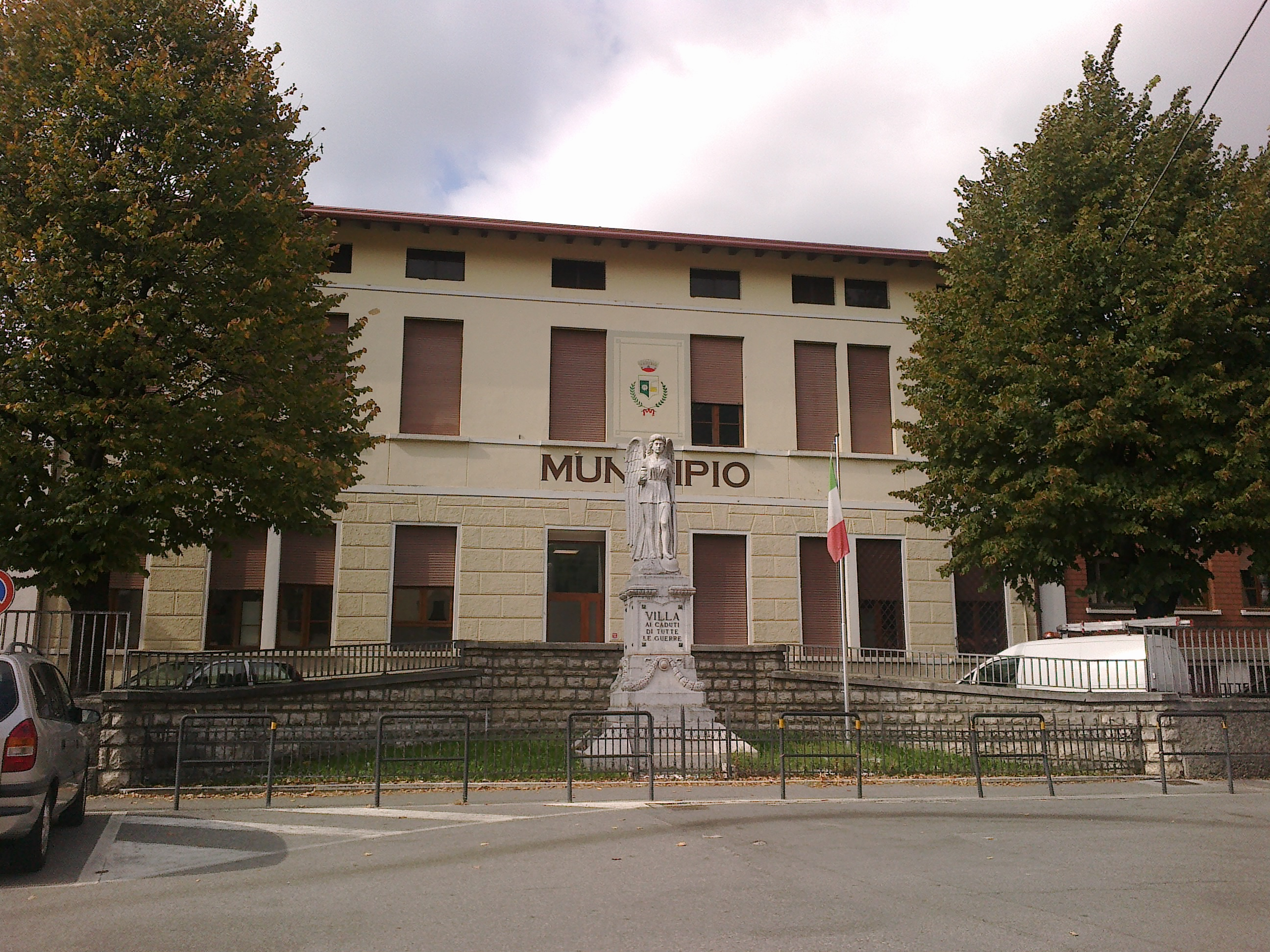 Un'immagine del Municipio del paese